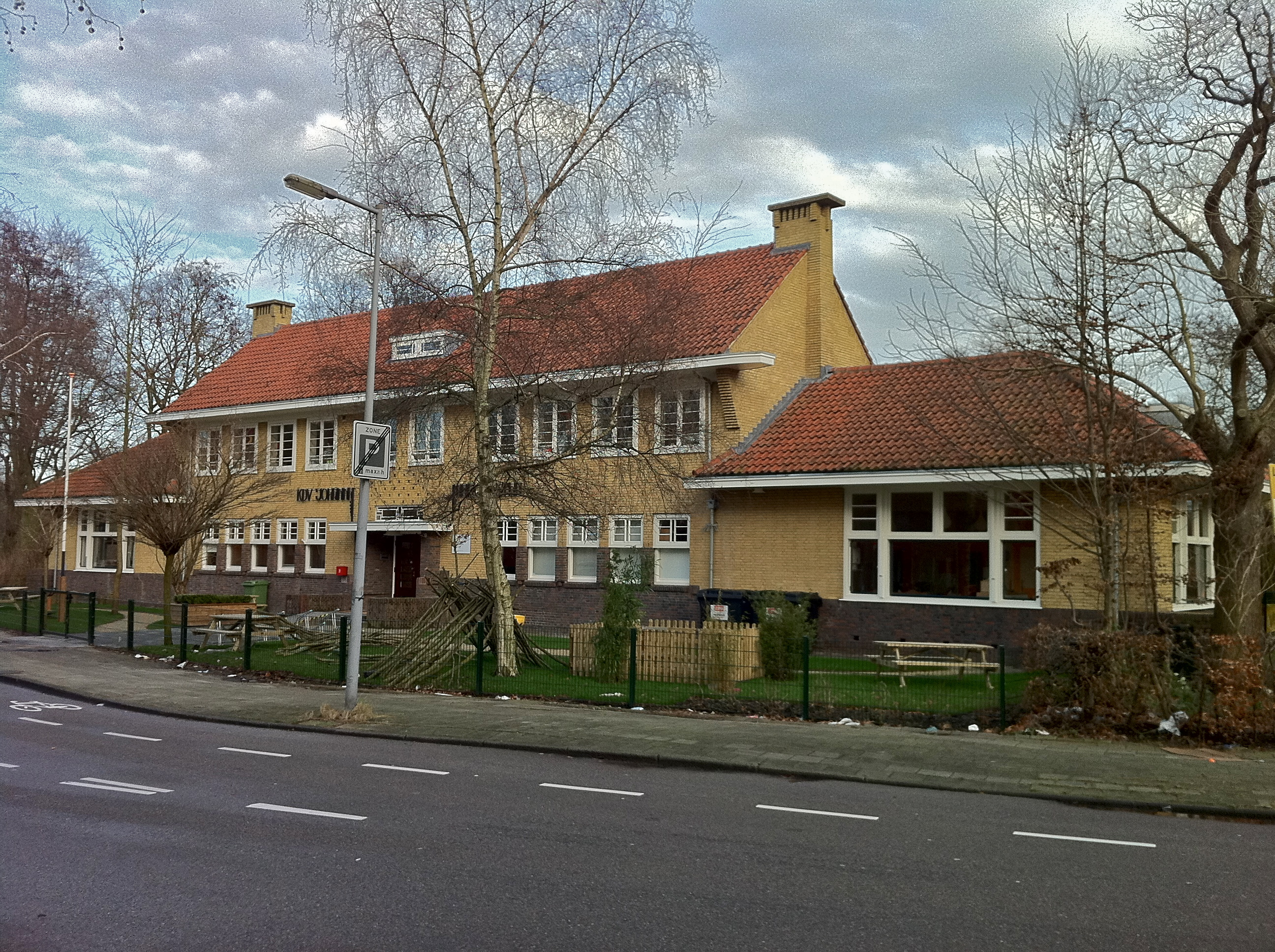 Kinderdagverblijf Johanna Margaretha, Wingerdweg 98, 1032 AN Amsterdam-Noord. Op deze locatie aan de rand van het Florapark hebben al tachtig jaar vele kinderen van nul tot en met zes jaar hun kindertijd doorgebracht. Het mooie pand, gebouwd in late Amsterdamse Schoolstijl, is in 1930 ontworpen door architect Th.J. Roetering als ‘Kinderbewaarplaats’ en daarmee het eerste gebouw in de stad dat speciaal voor deze bestemming is neergezet. En mogelijk zelfs in heel Nederland.